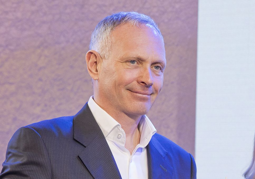 Armin Karu, aasta kultuurisõber 2017